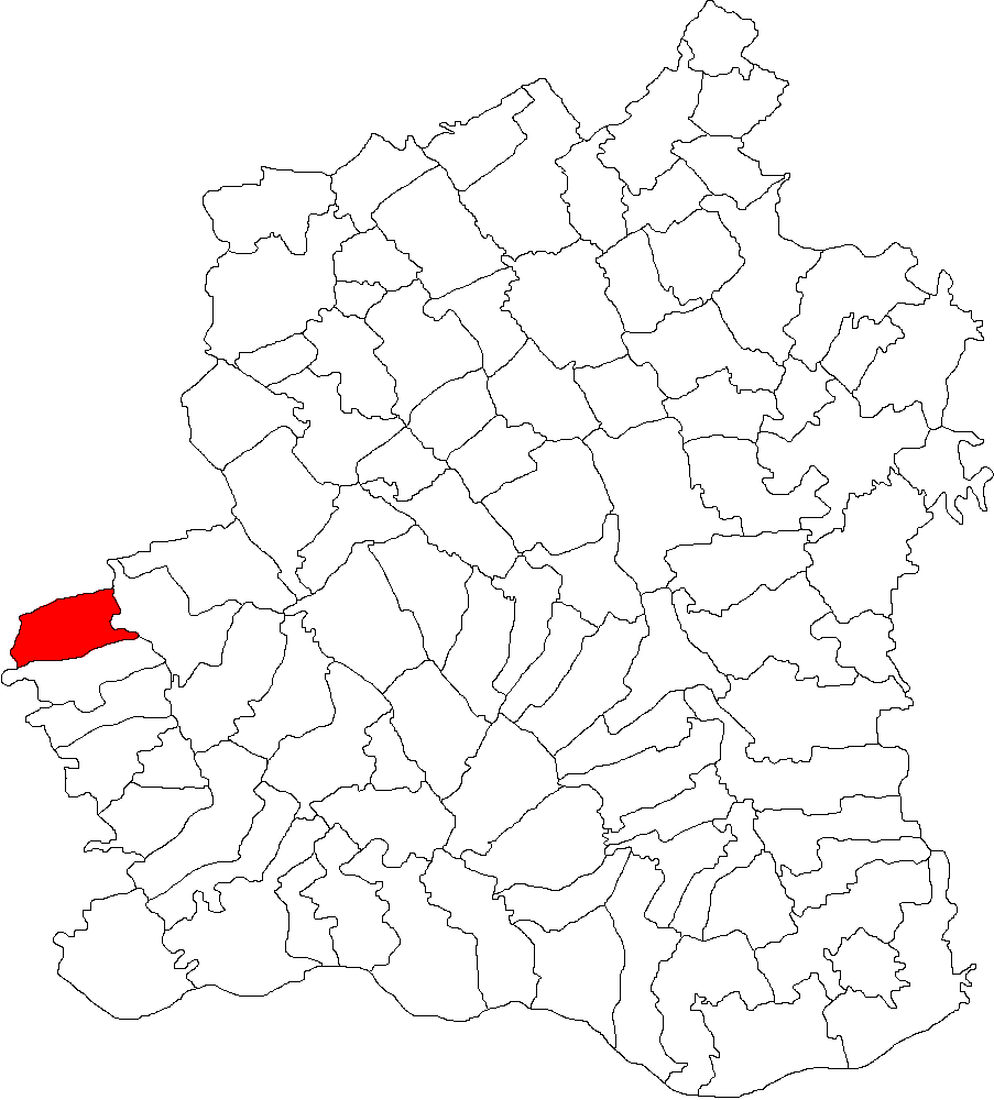 Categorie:Hărţi ale judeţului Teleorman